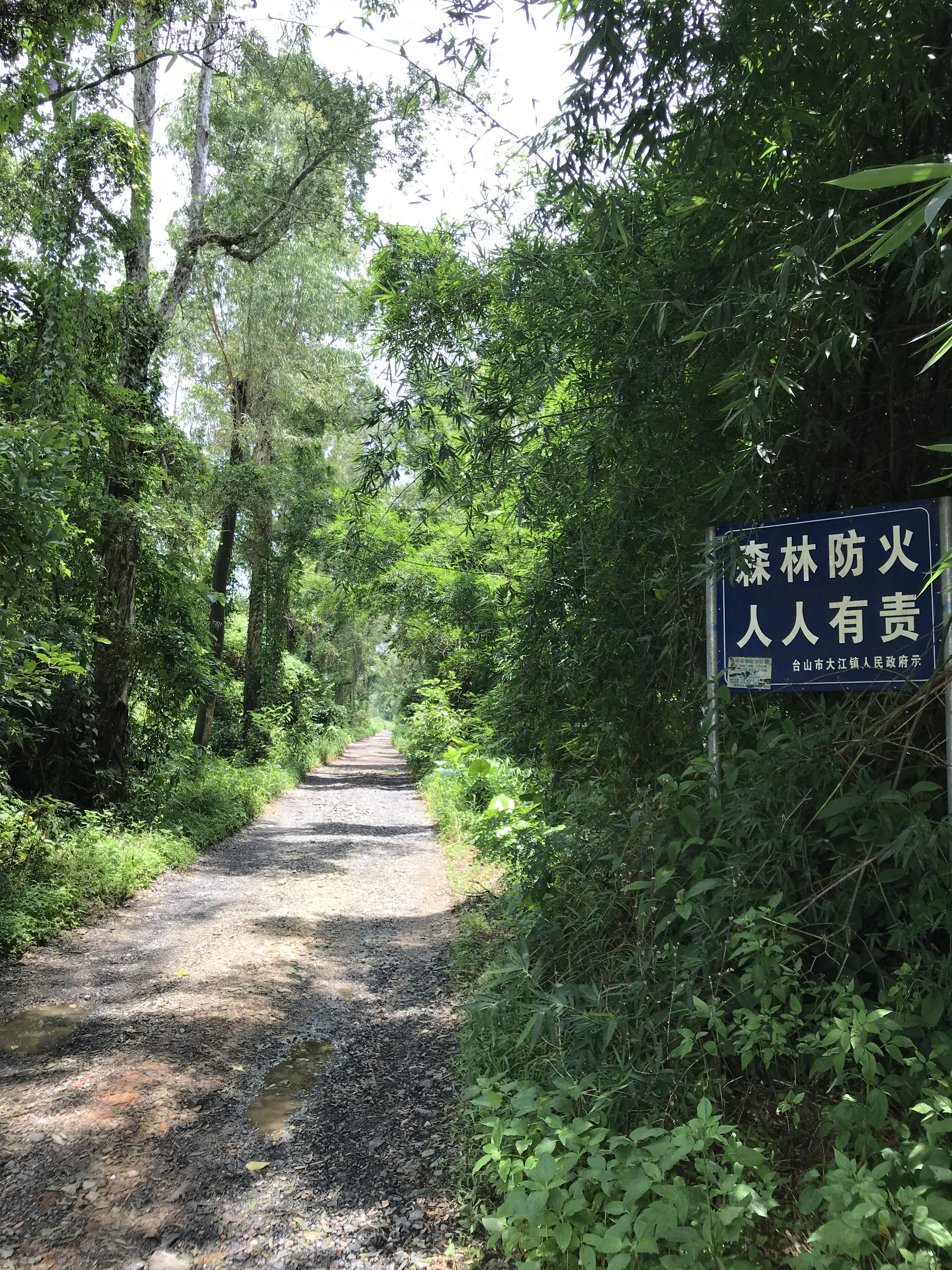 中文（香港）: 位於台山大江鎮塘面鄉河木村村口的新寧鐵路路基遺跡